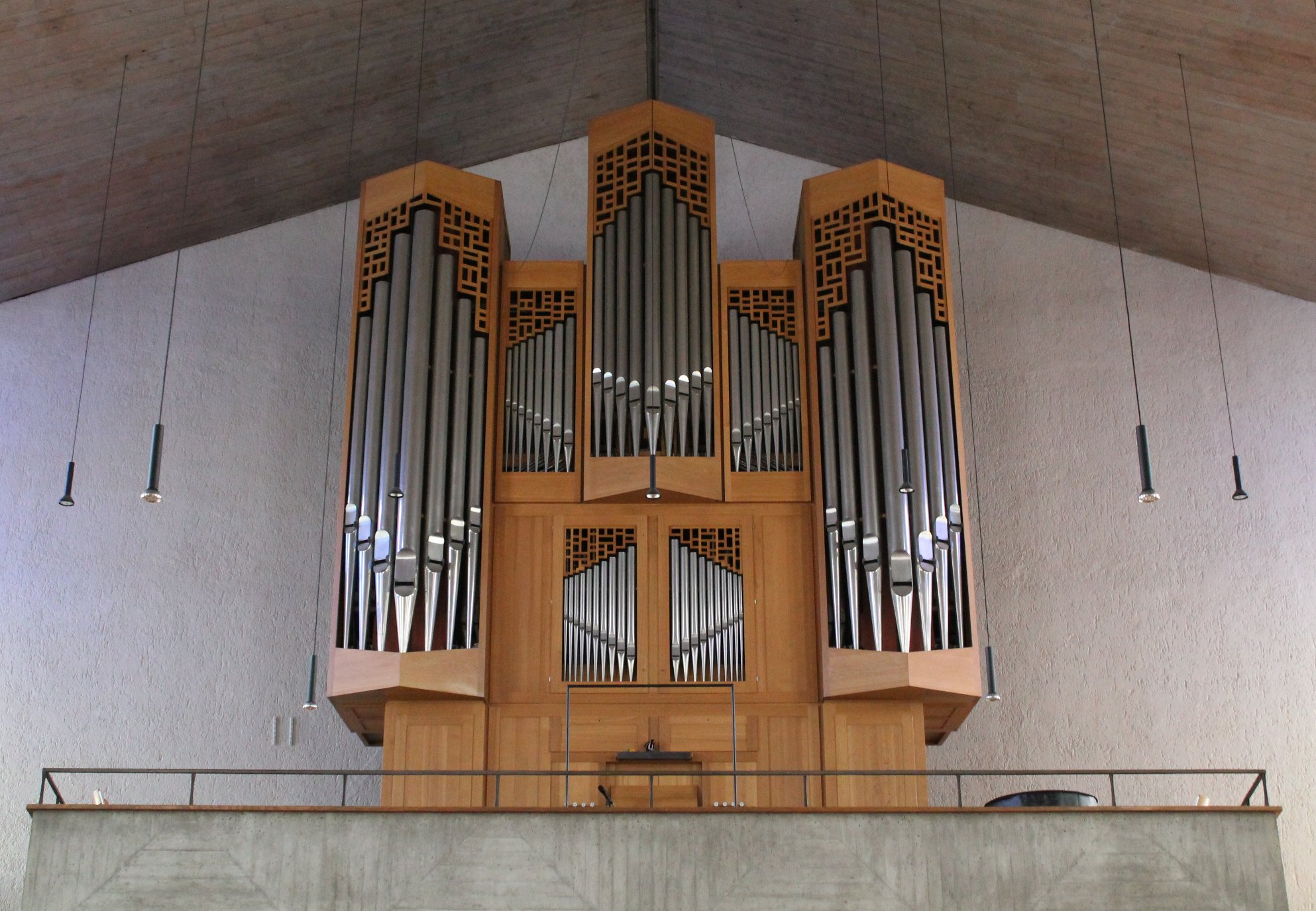 Orgel von St. Willibald in München (Führer 1993, III/41)